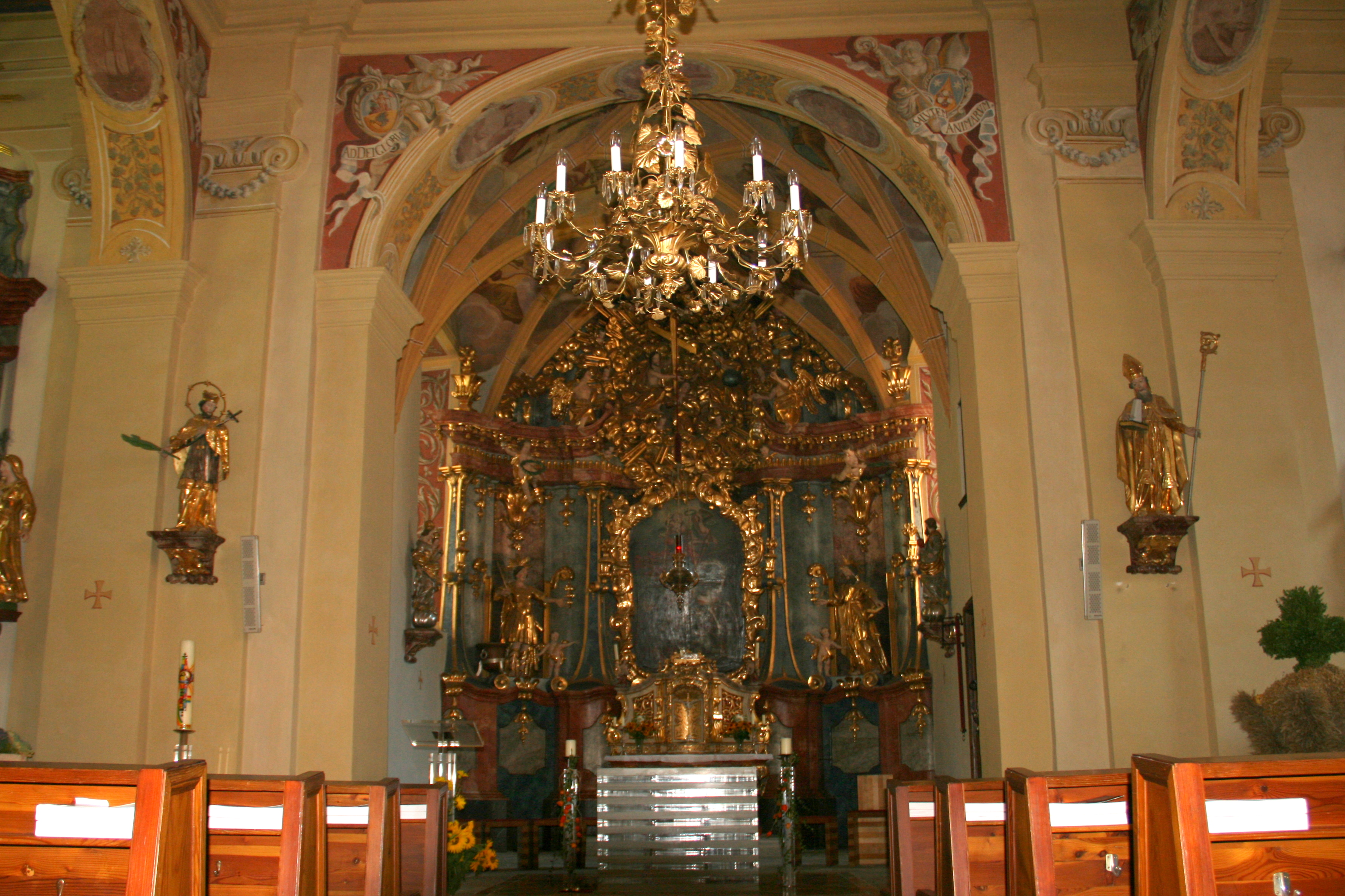 Kath. Pfarrkirche hl. Georg und Kirchhofmauer mit Nischenkapelle